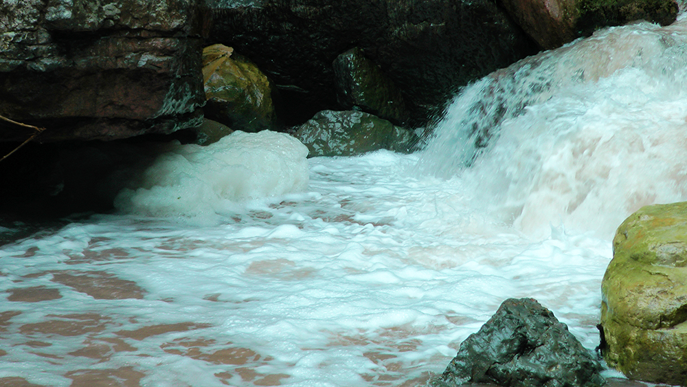 Río Cachiyacu de San Ana - Shapaja Uchiza